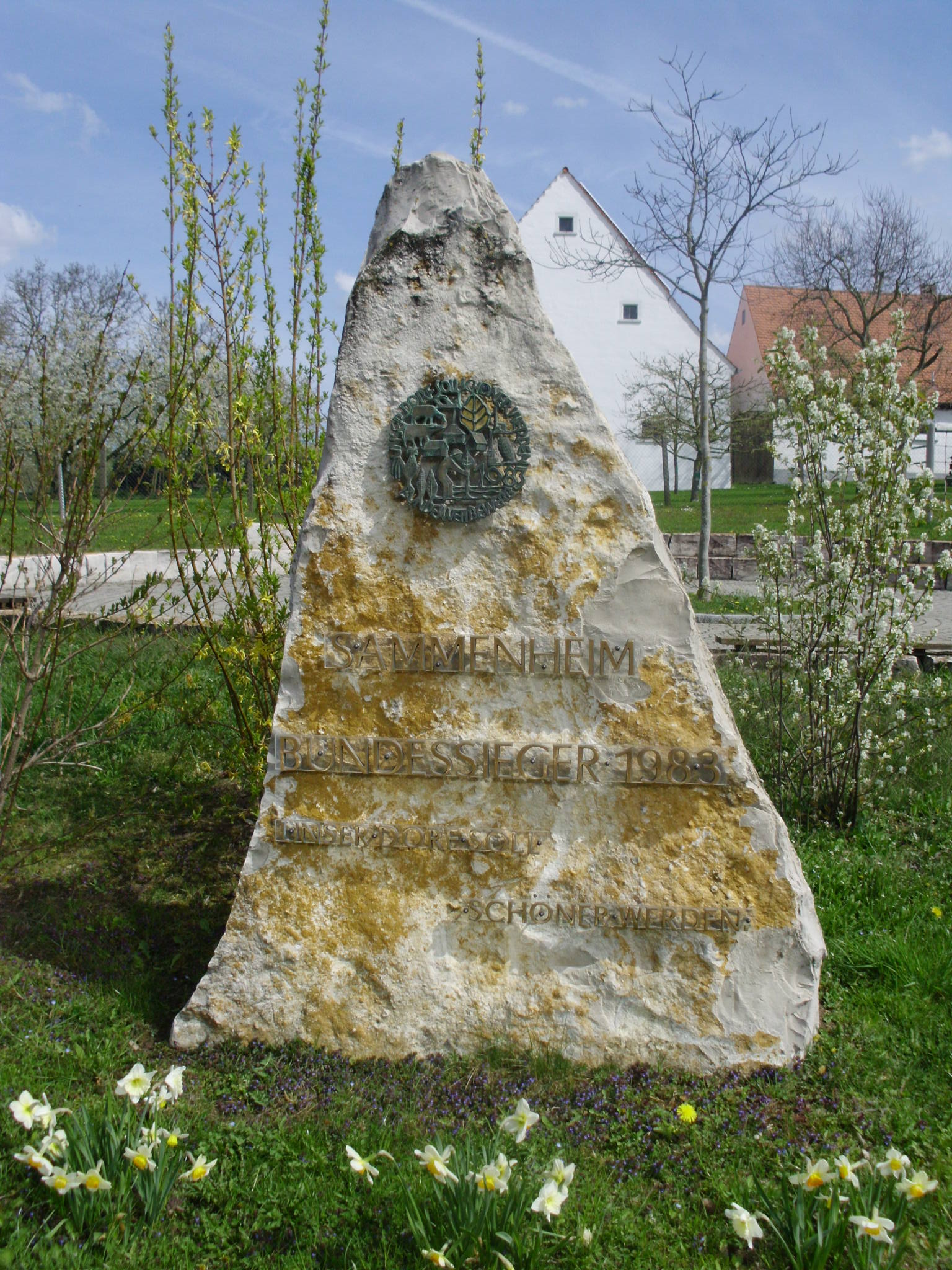 Sammenheim, Ortsteil der Gemeinde Dittenheim im mittelfränkischen Landkreis Weißenburg-Gunzenhausen, Gedenkstein für den Bundessieg 1983 "Unser Dorf soll schöner werden"